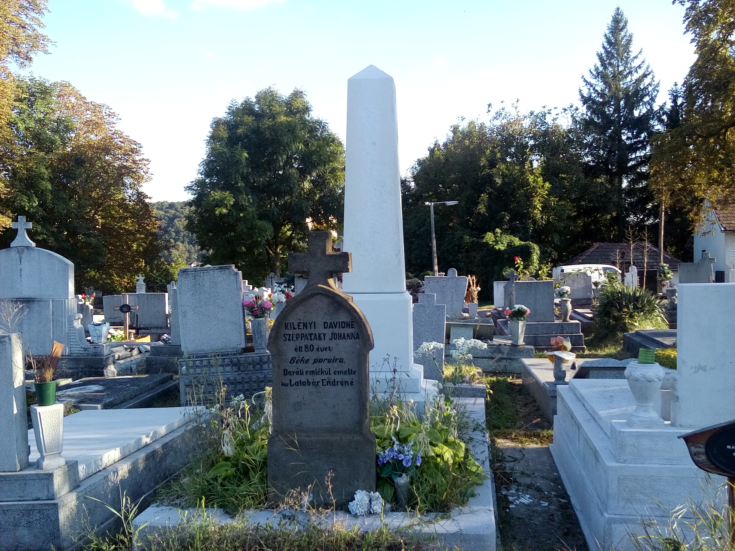 Kilényiné Széppataky Johanna sírja a miskolci Szent Anna temetőben